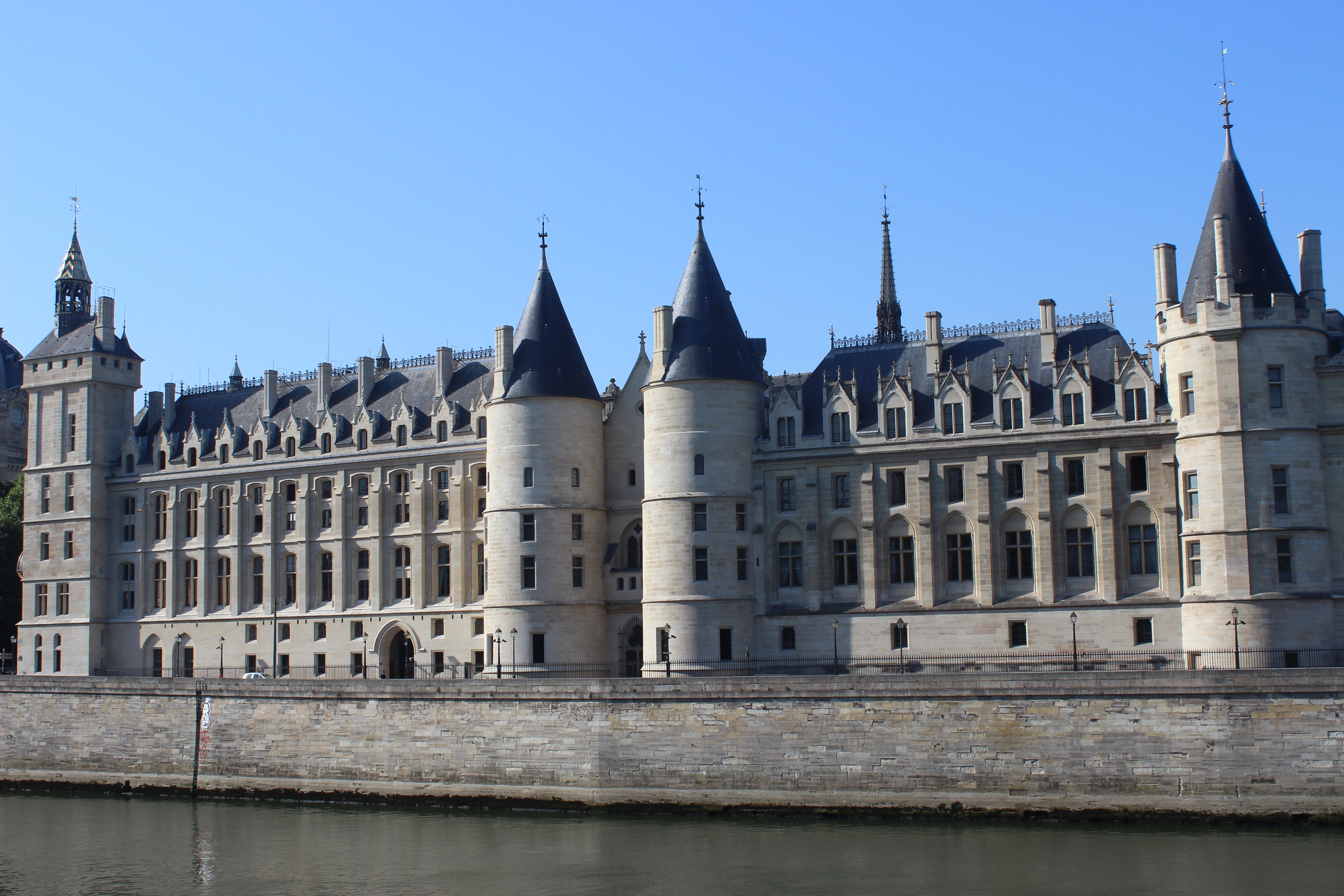 París. Conciergerie, fachada al Sena.